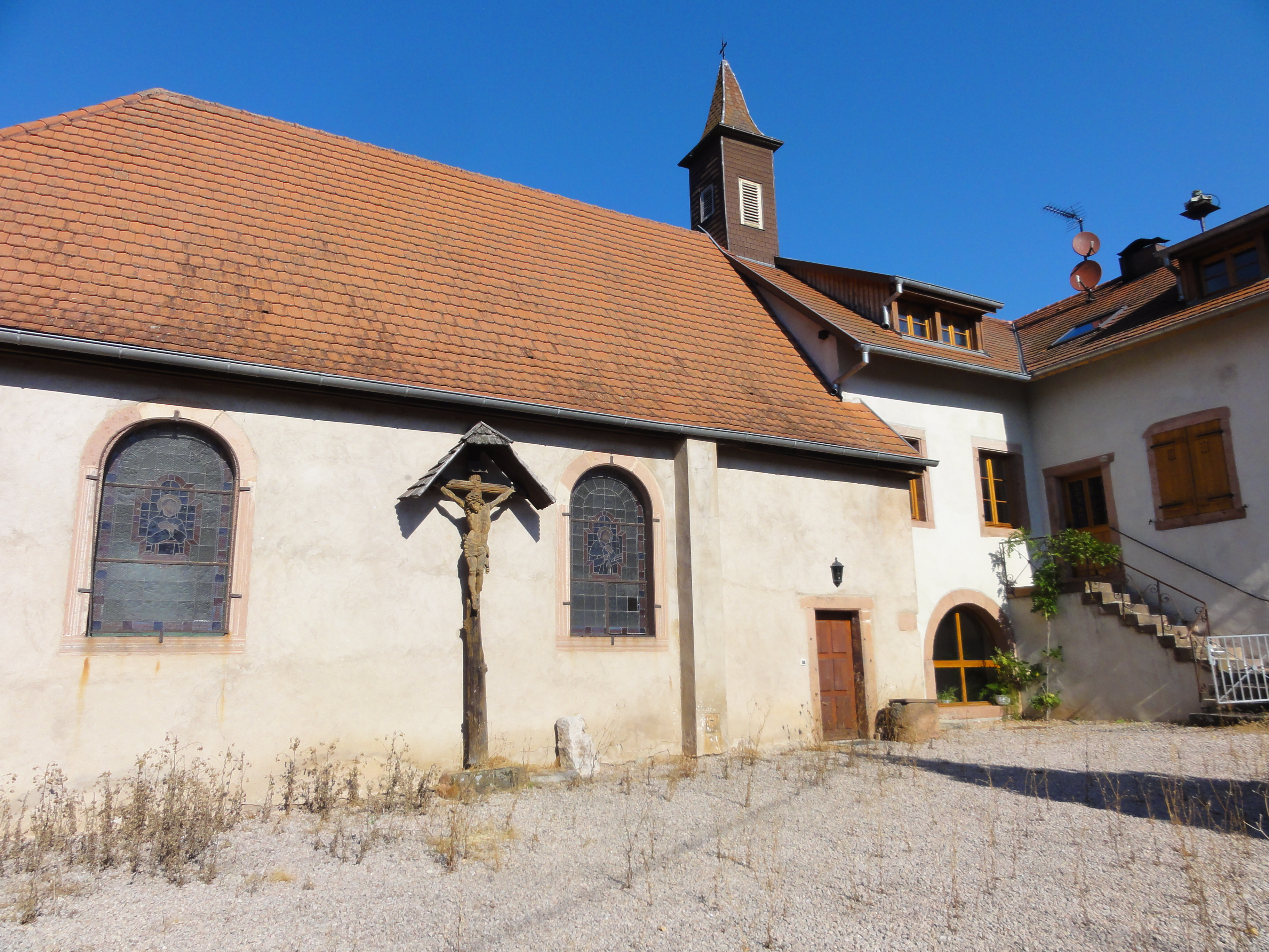 Alsace, Bas-Rhin, Saint-Pierre-Bois, Chapelle du presbytère catholique (1867)